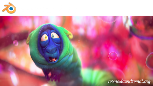 Blender 2.75a Splash Blender Foundation - Blender